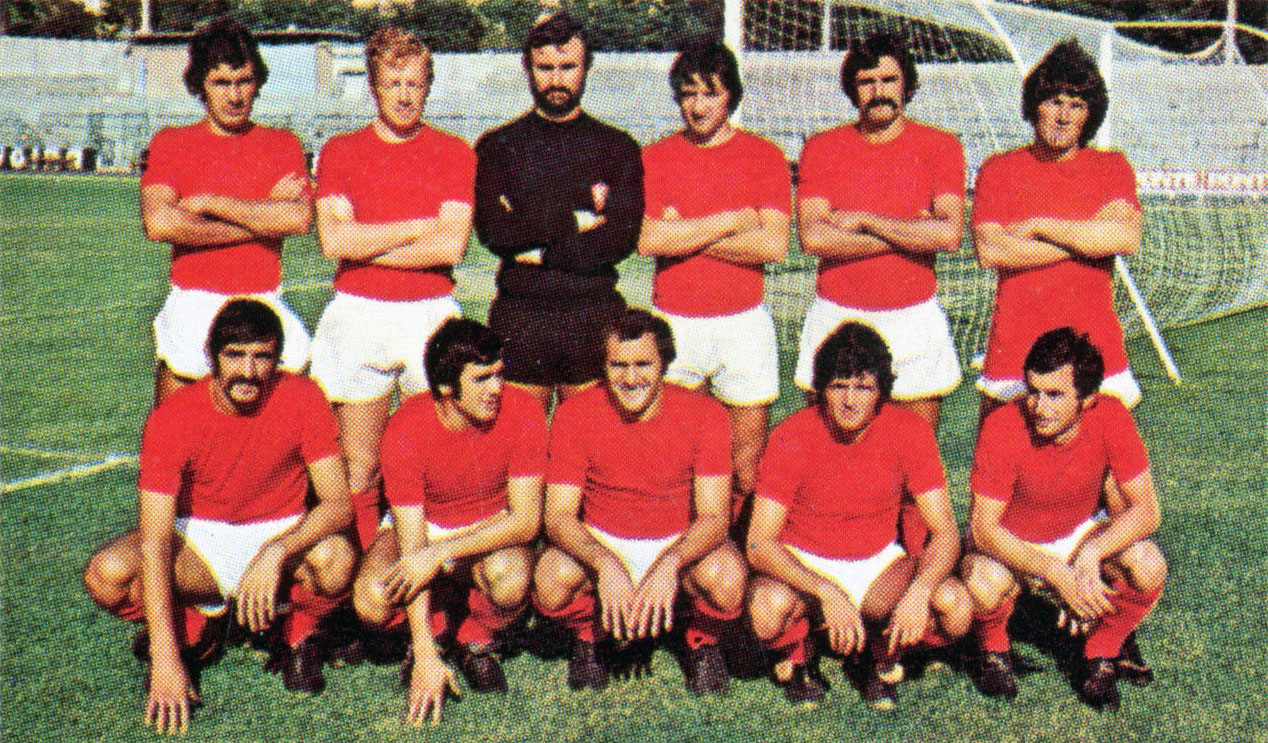 Una formazione del Perugia nella stagione 1973-74, in posa all'interno dello stadio Santa Giuliana di Perugia. Da sinistra, in piedi: M. Scarpa, A. Lombardi, L. Grosso, P. Petraz, R. Innocenti (capitano), L. Maianti; accosciati: F. Zana, G. Urban, D. Parola, C. Tinaglia, G. Picella.